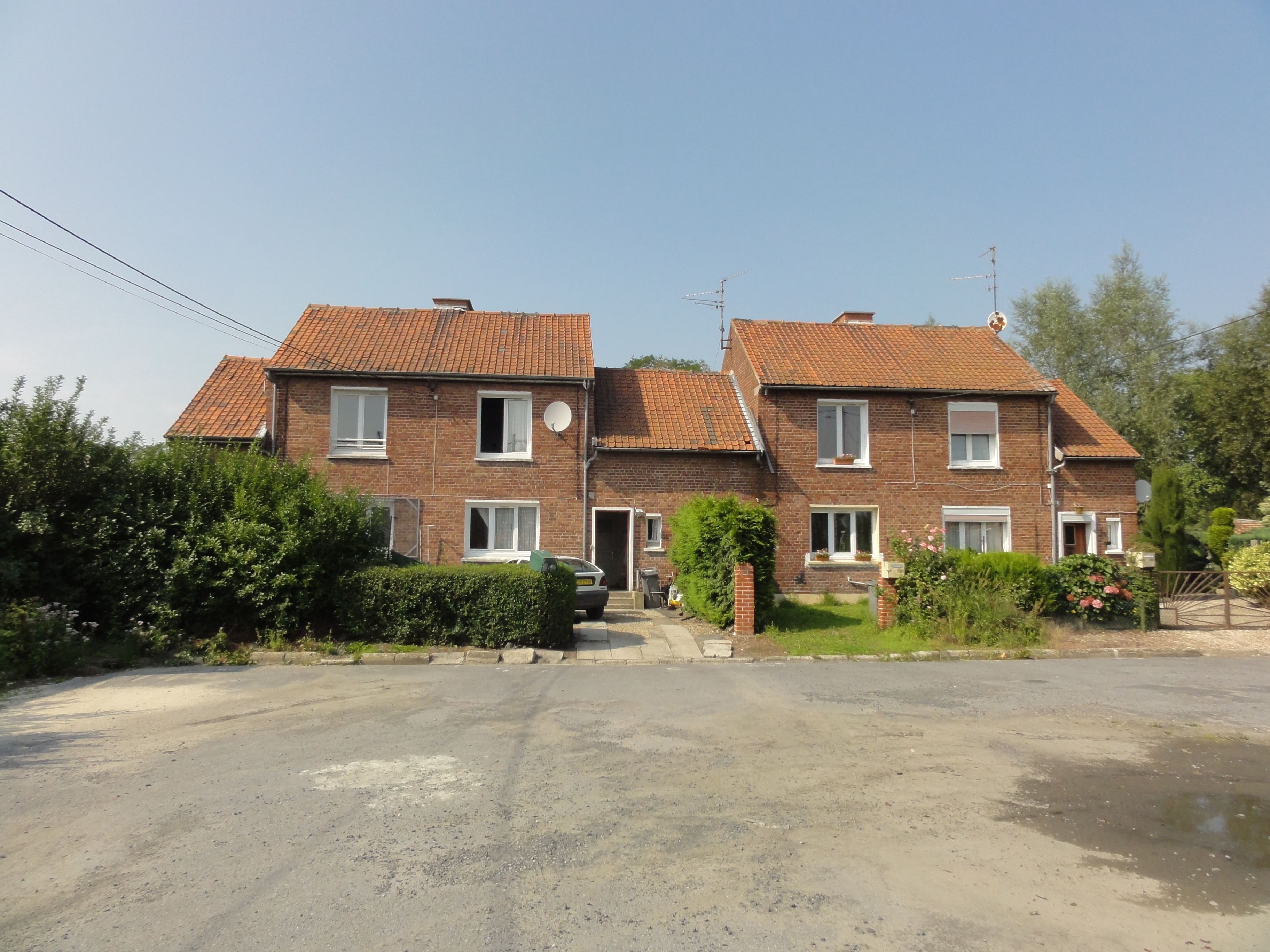 Cités des fosses Soult de la Compagnie des mines de Thivencelle, Fresnes-sur-Escaut, Nord, Nord-Pas-de-Calais, France.